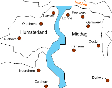 Zelf gemaakte kaart op basis van topografische kaart en kaart fysische geografie